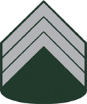 Insígnia de 3º Sargento do Exército Brasileiro - Regulamento de Uniformes do Exército/2016.